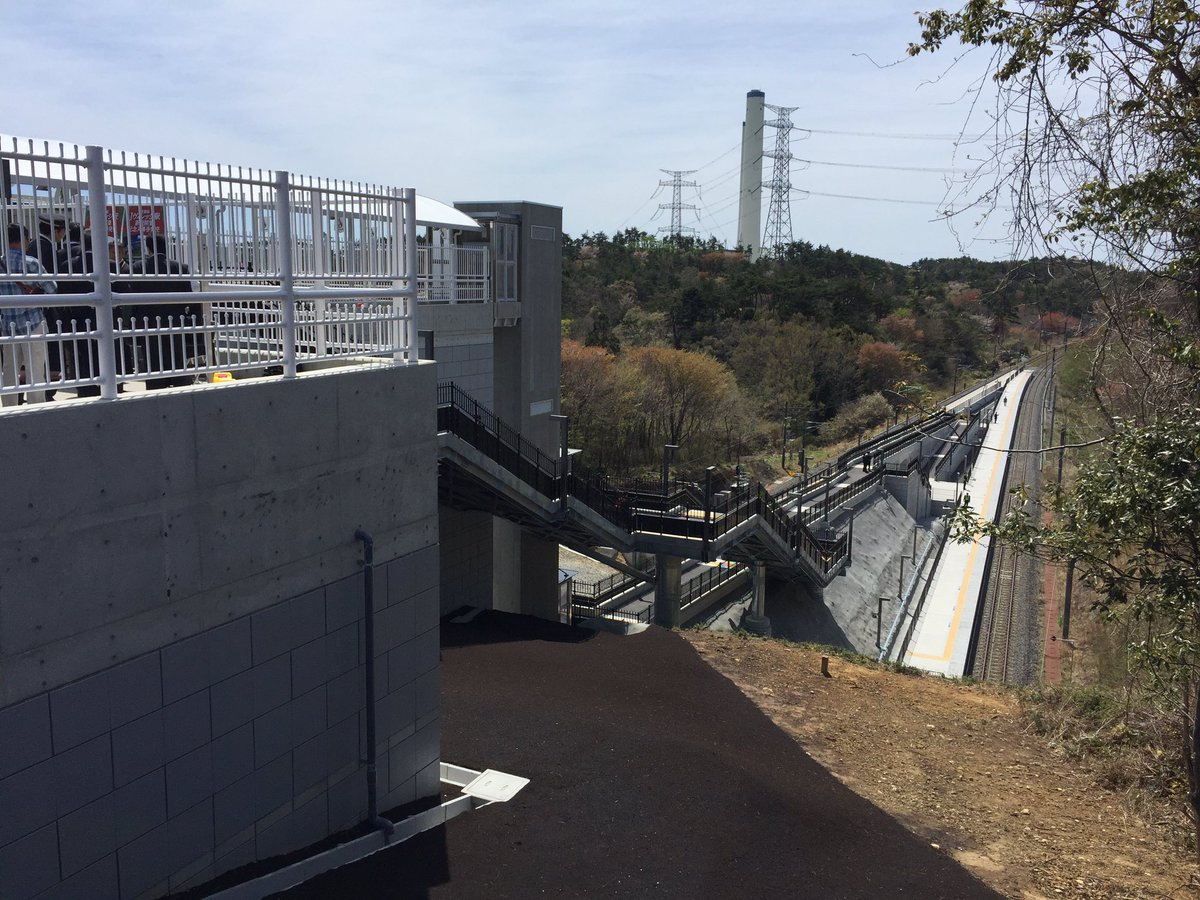 開業日のJヴィレッジ駅ホームを上から撮影